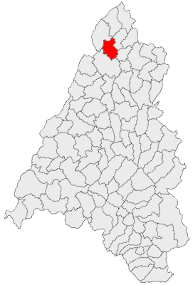 Categorie:Hărţi ale judeţului Bihor